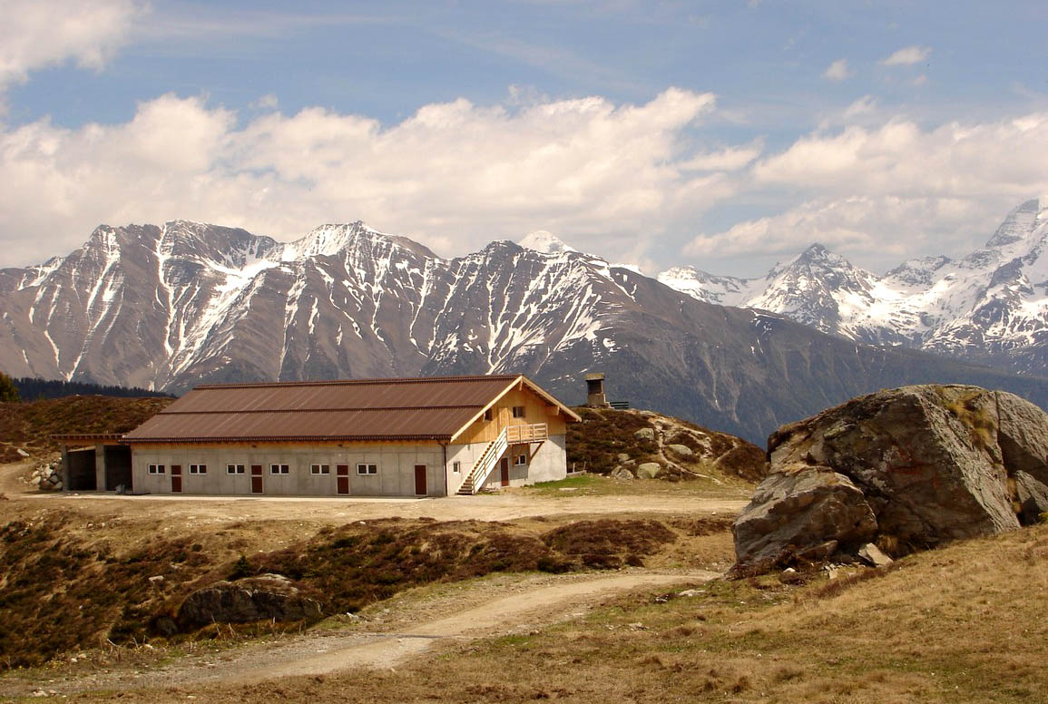 Senntum auf der Belalp